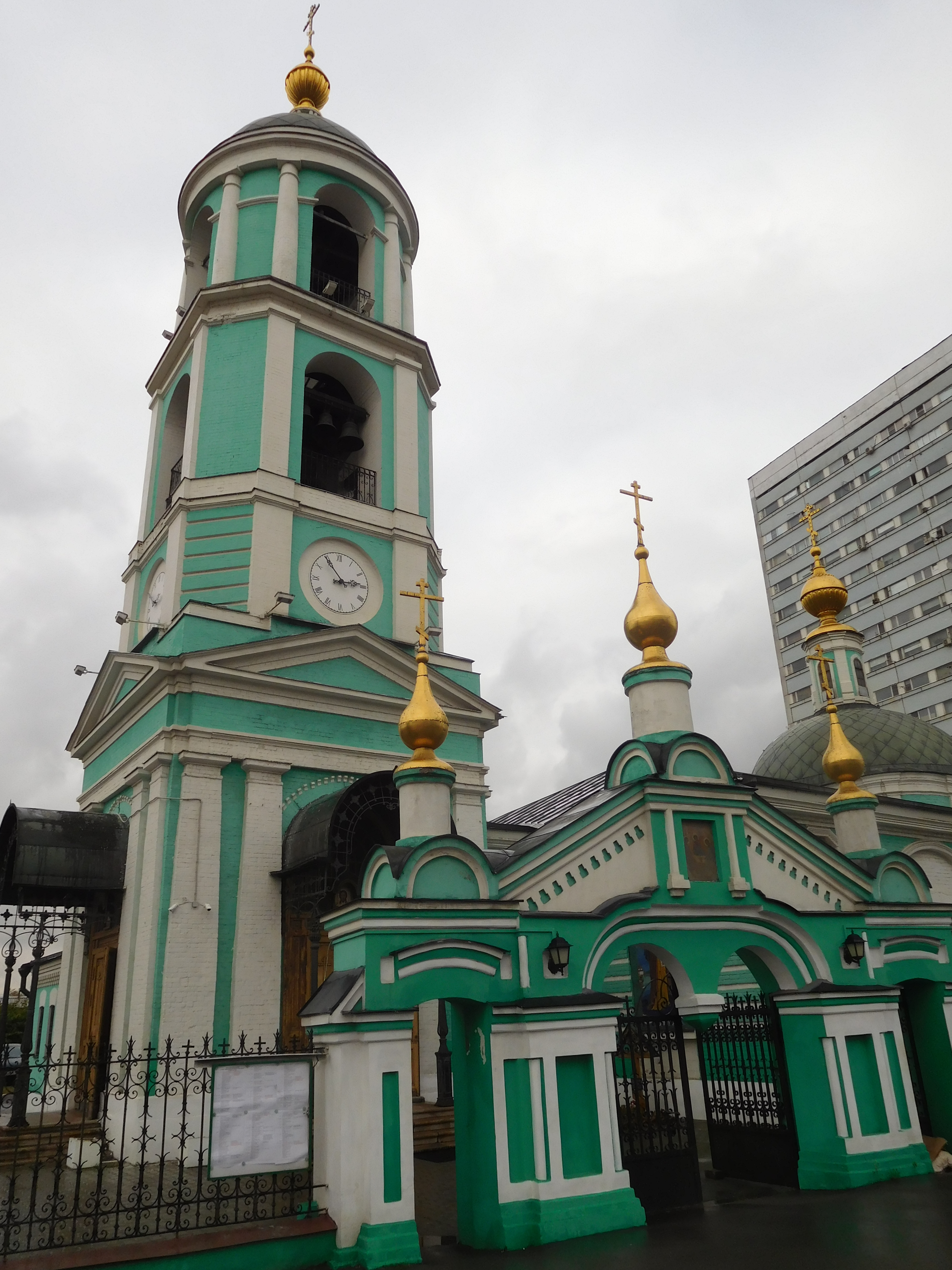 Храм Живоначальной Троицы в Карачарове